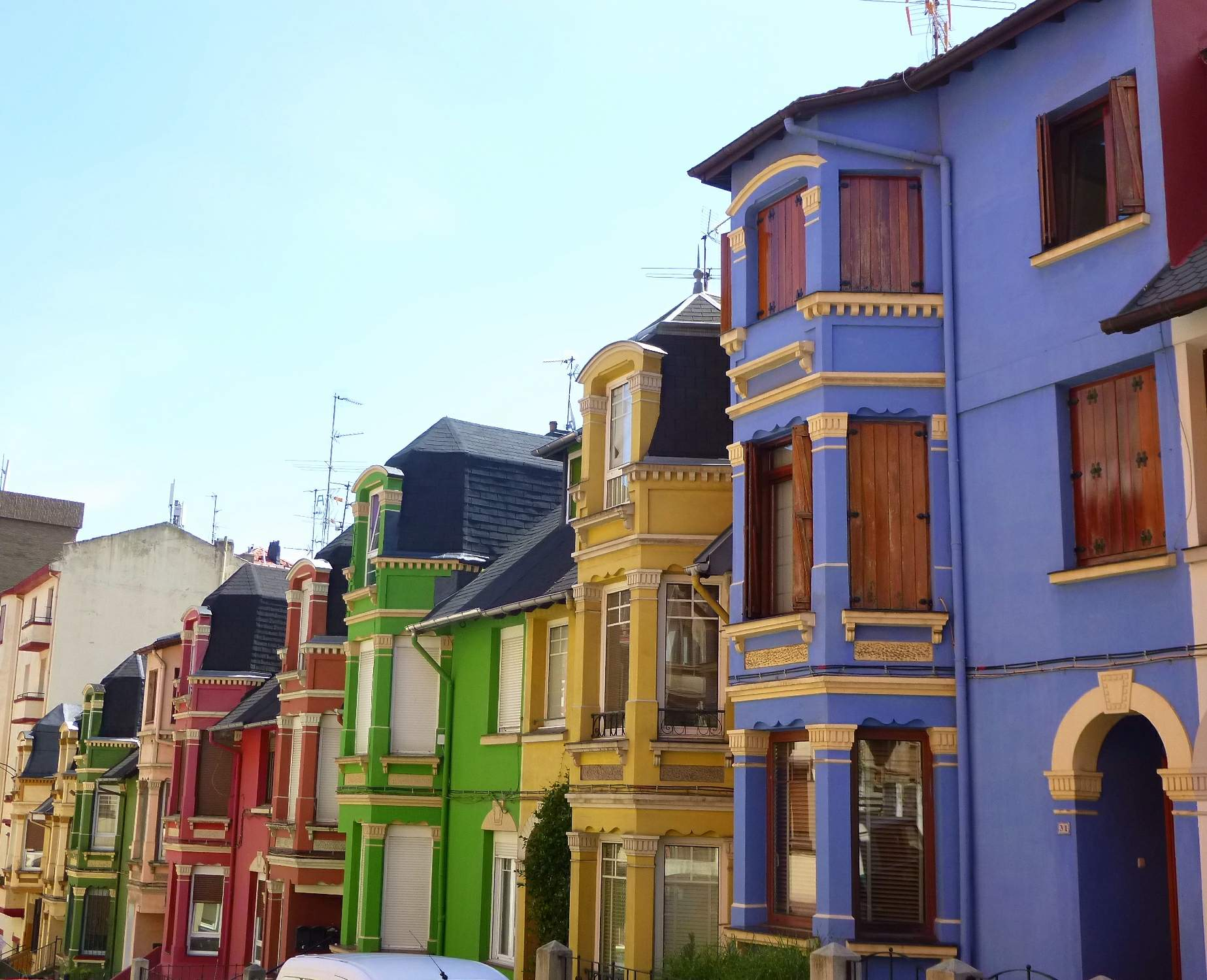 Bilbao - Calle Zuberoa (barrio de Iralabarri, distrito de Errekalde)